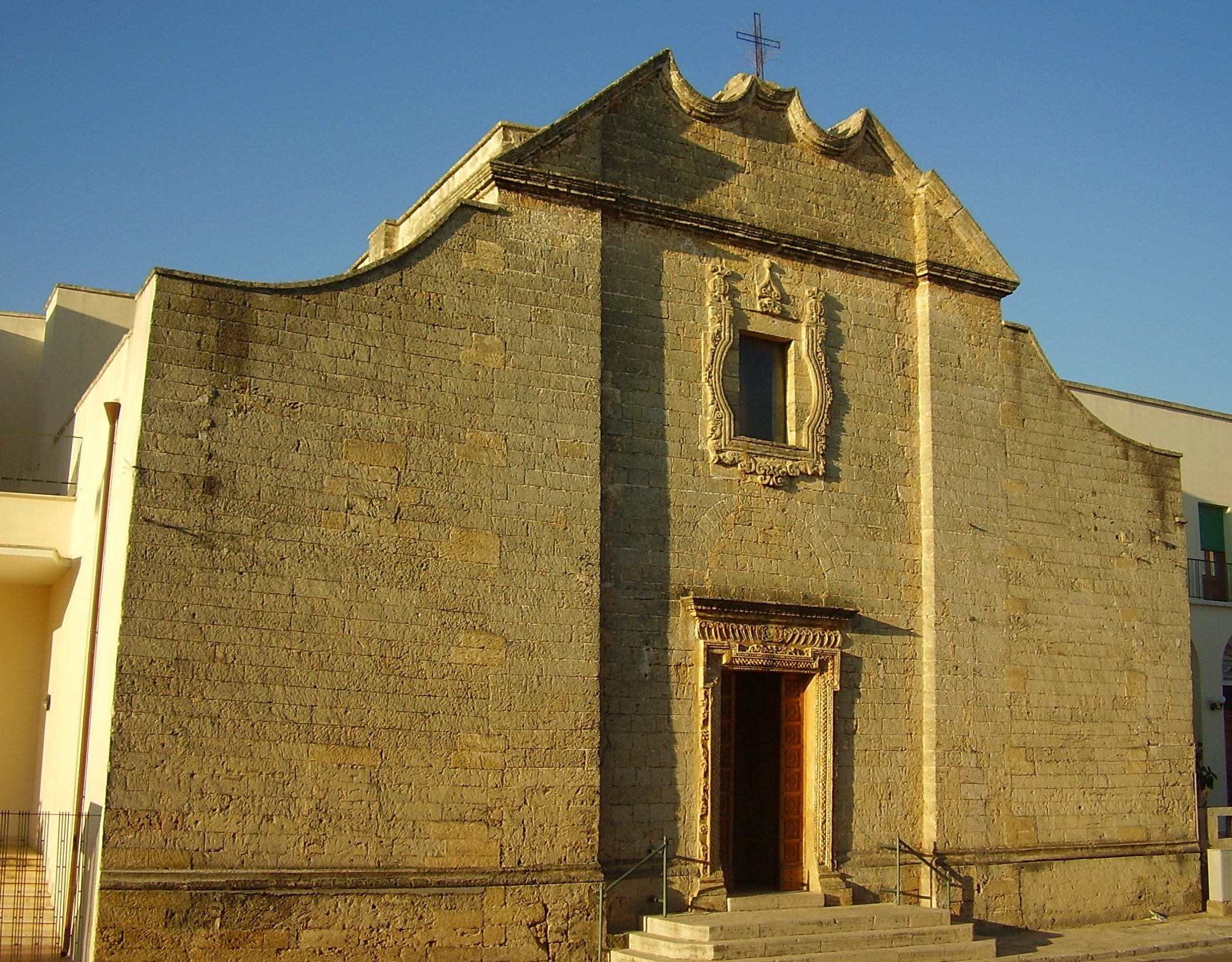 Chiesa della Madonna del Pane Novoli, Lecce